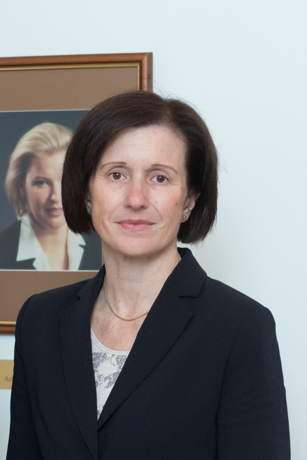 Ilze Cīrule